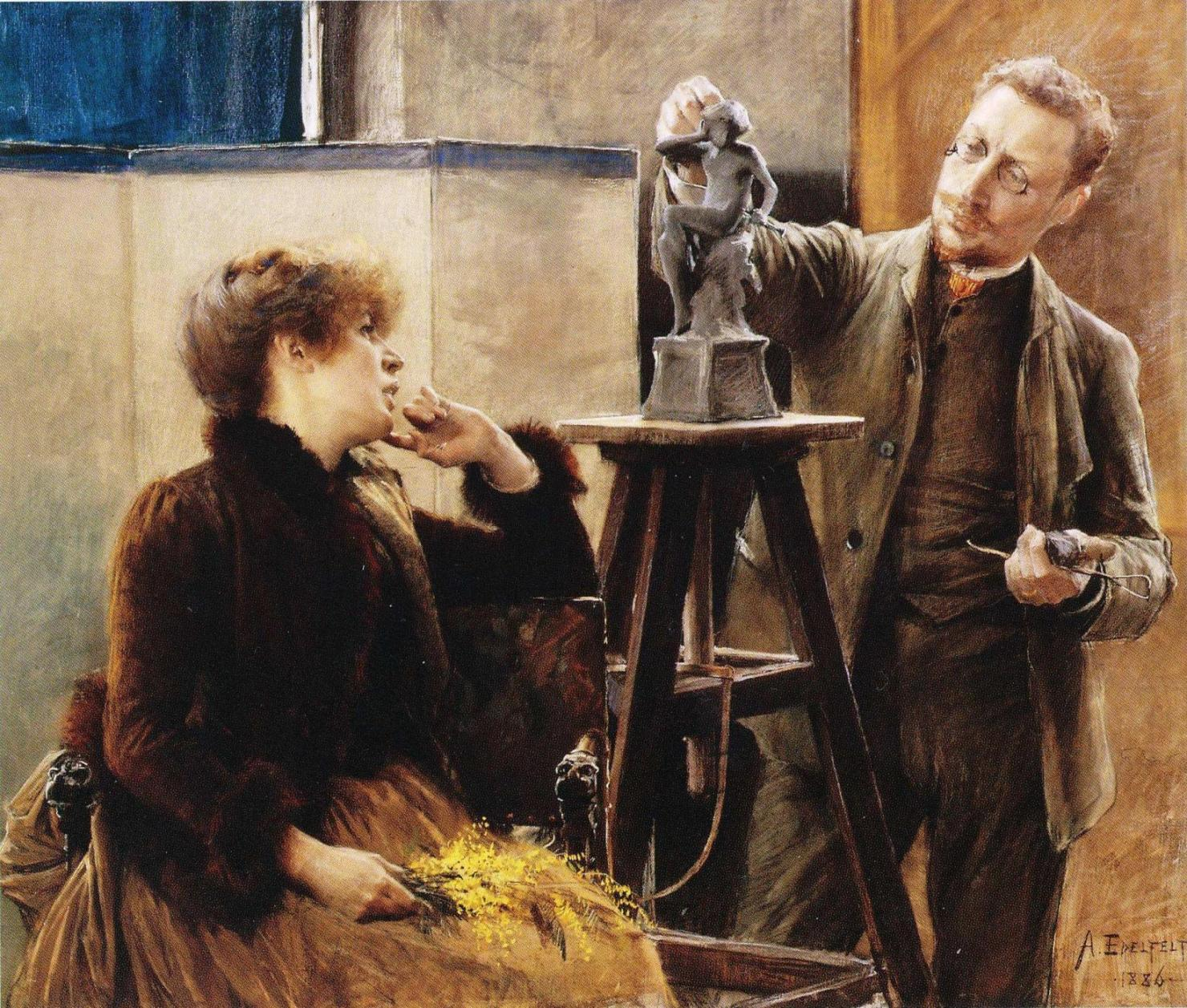 Kuvanveistäjä Ville Vallgren (1855–1940) ja hänen ensimmäinen puolisonsa, Antoinette Vallgren, o.s. Råström (1858–1911). Ville Vallgren muovailee saviluonnosta veistokseensa Kaiku.